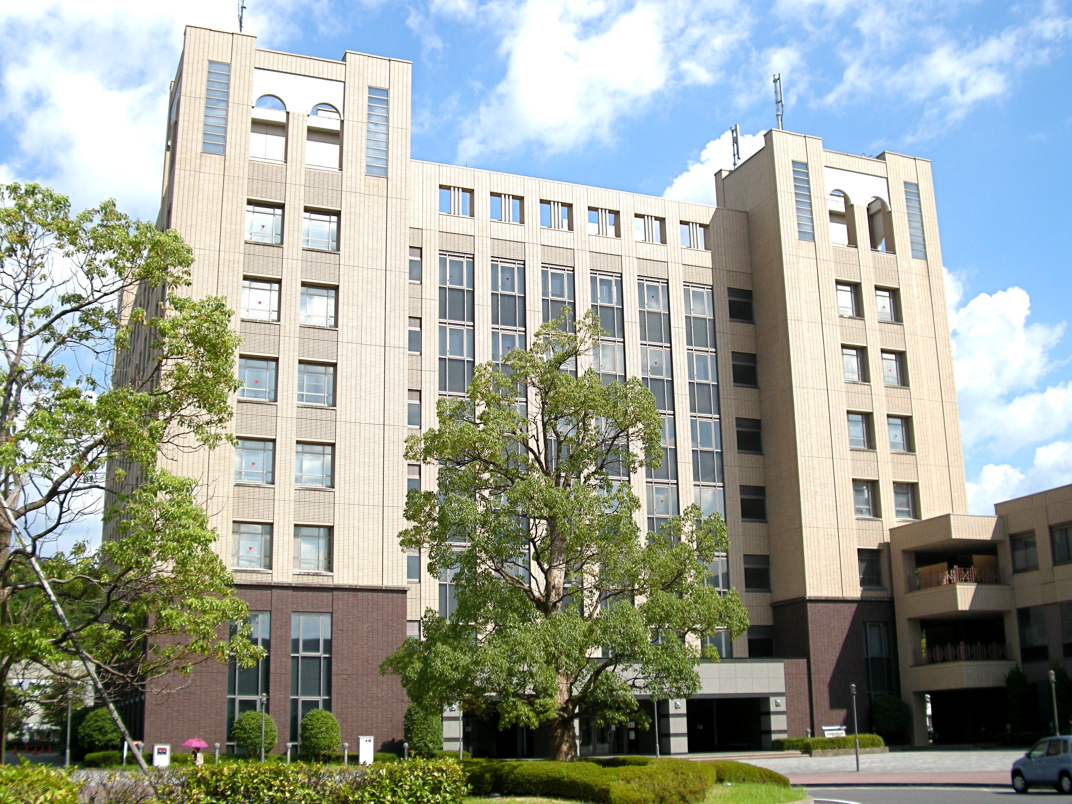 East Wing (Biwako Kusatsu Campus, Ritsumeikan University, Shiga, Japan)